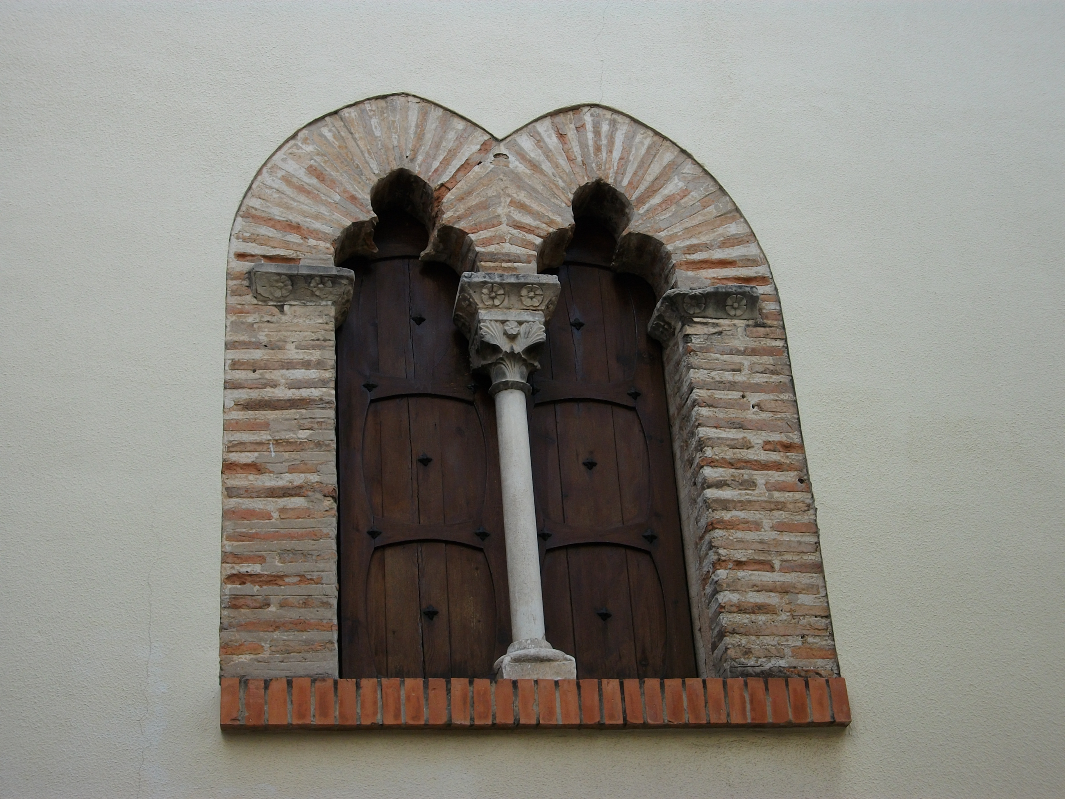 Finestra gòtica del desparegut Palau dels Centelles d'Oliva.